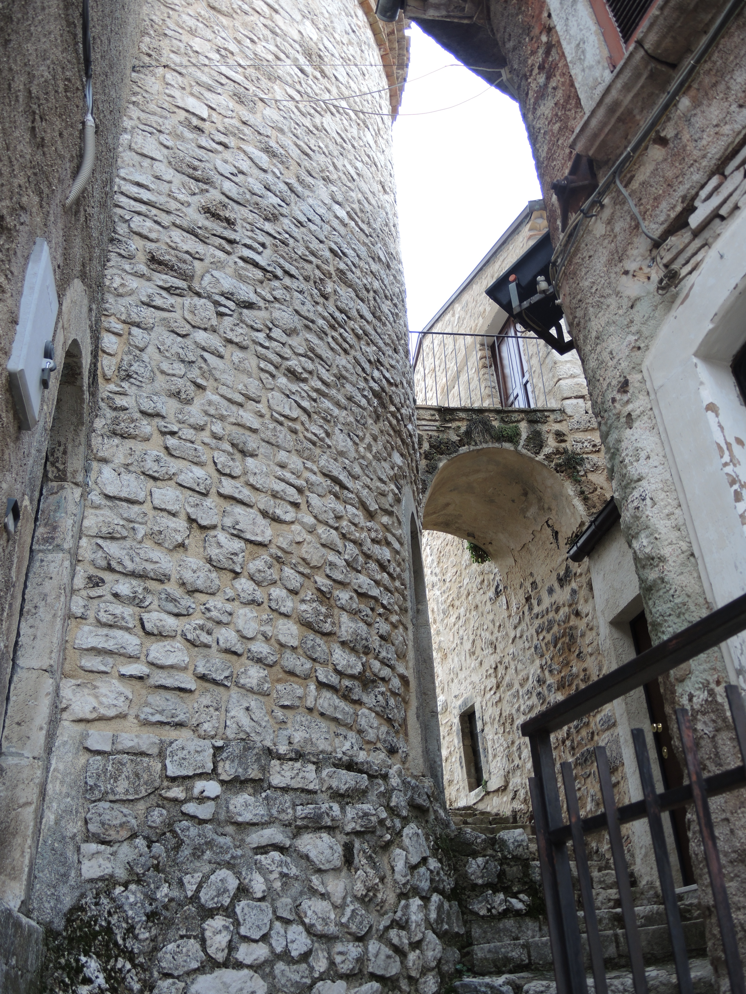 Villalago